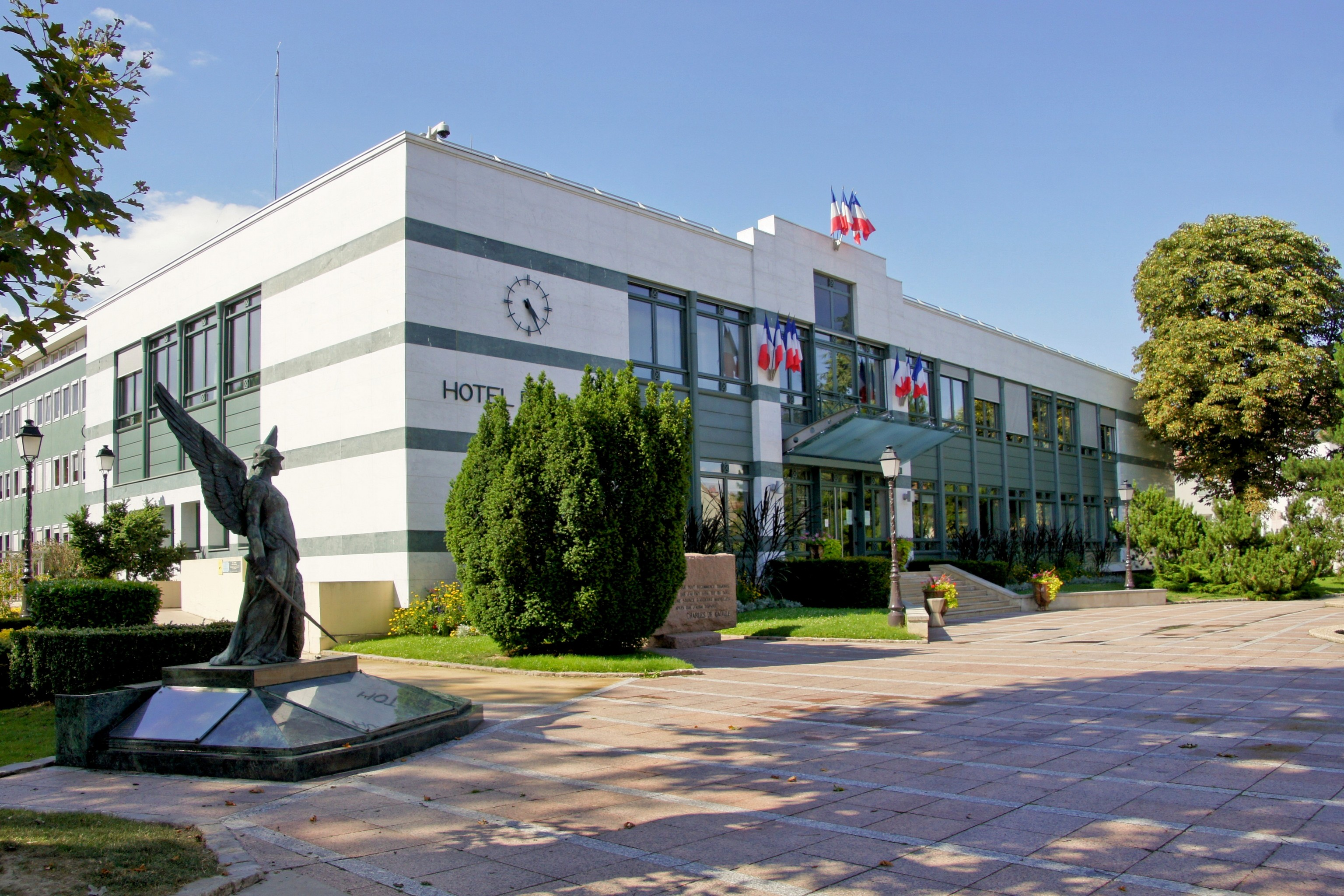 La mairie d'Antony (92)